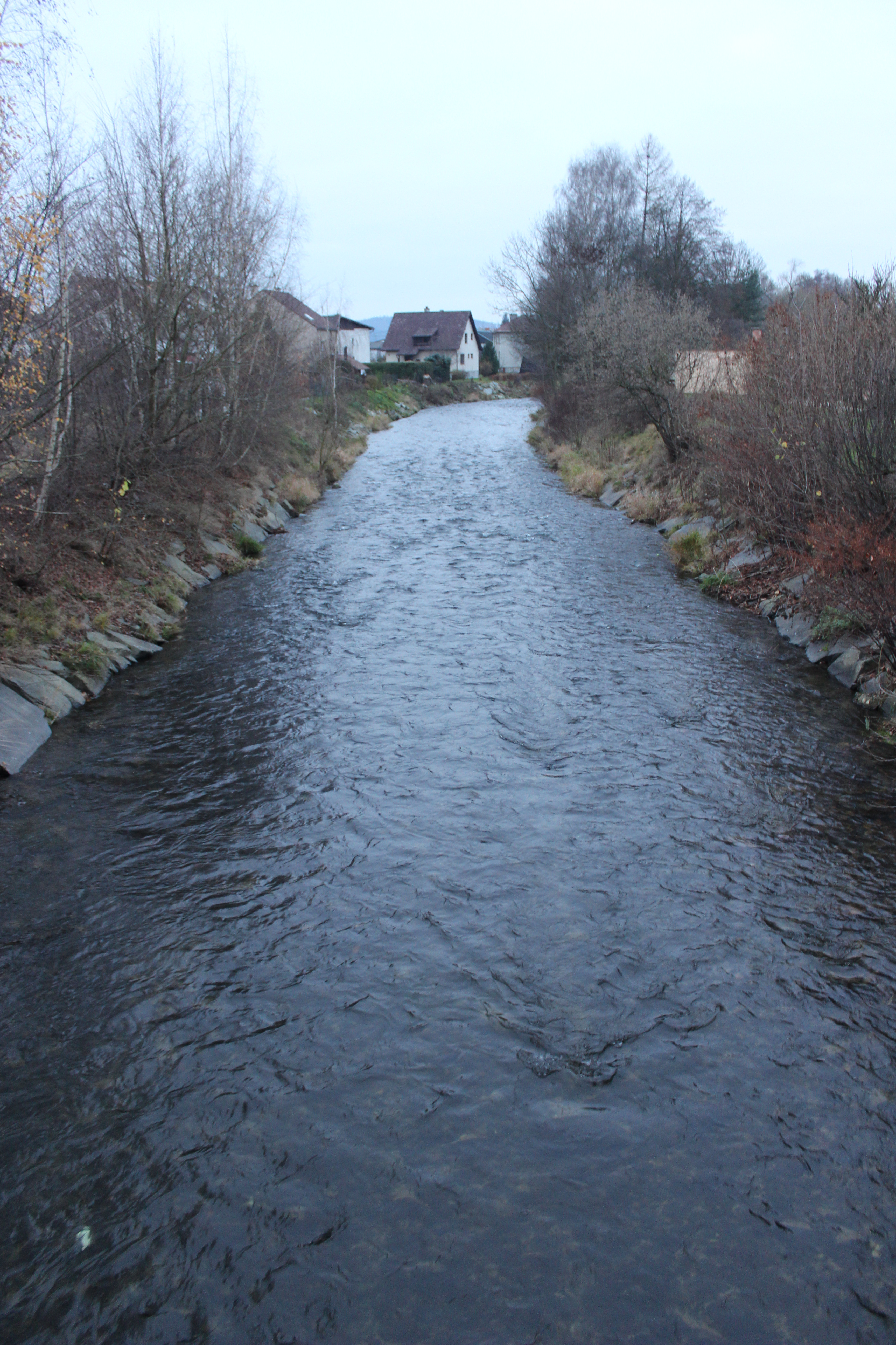 Desná ze zastřešené lávky ve Vikýřovicích (pohled po proudu).